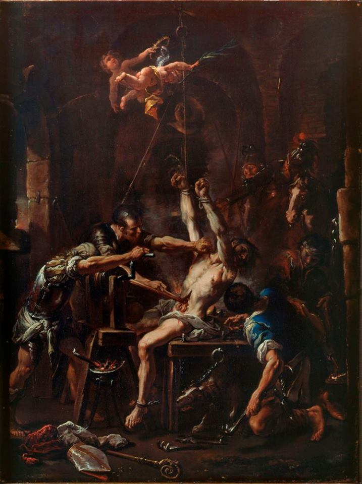 Martirio di sant’Erasmo (L'opera mostra l'evidente influenza di esempi di Alessandro Magnasco, cui il dipinto fu pure assegnato, che di Sebastiano Ricci fu intimo amico)